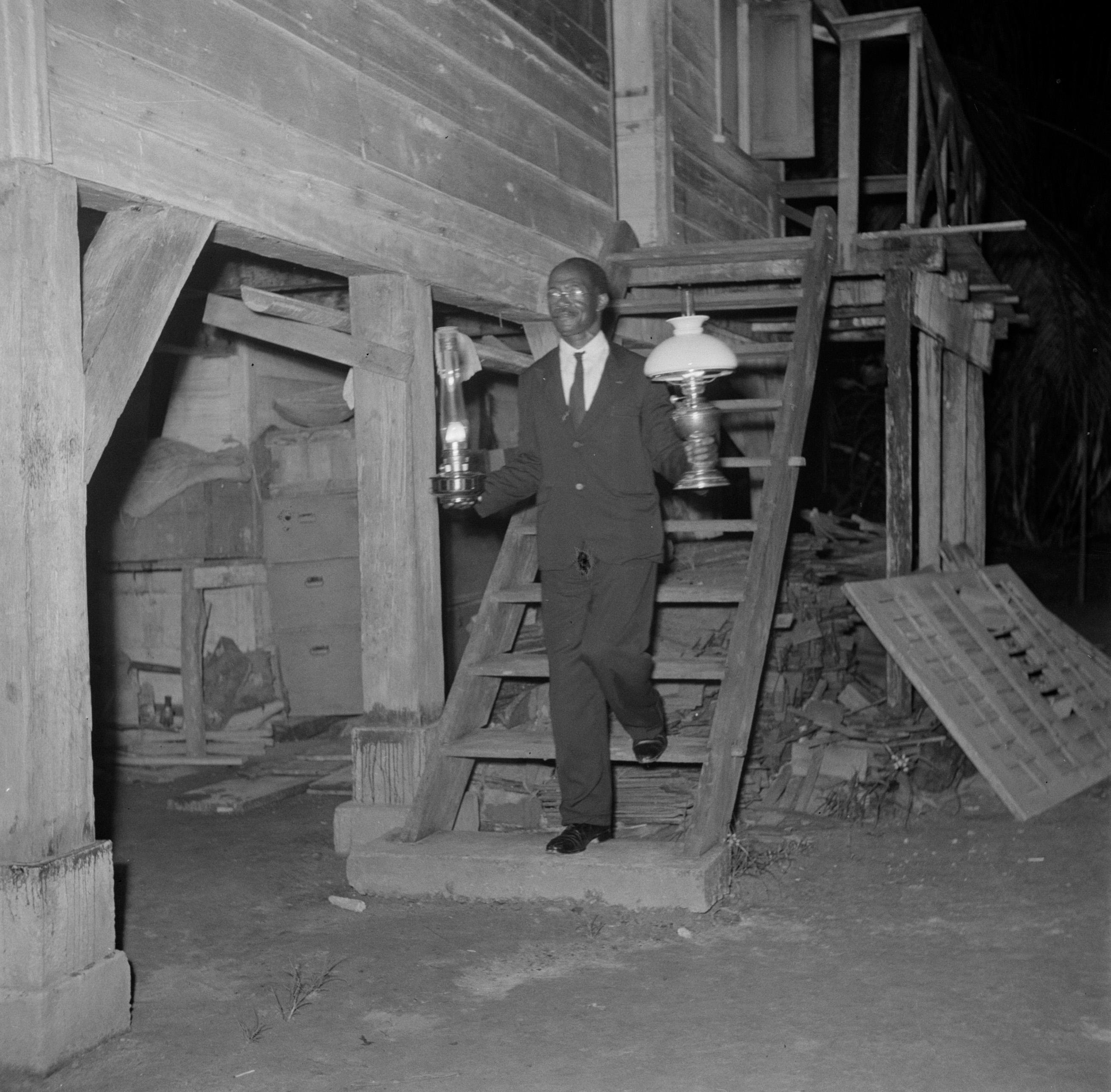 Collectie / Archief : Fotocollectie Van de Poll Reportage / Serie : Reis naar Suriname en de Nederlandse Antillen Beschrijving : Herman Leerdam, Van de Polls gastheer in Langetabbetje Datum : 1947 Locatie : Langatabbetje, Marowijne, Suriname Trefwoorden : lampen Persoonsnaam : Leerdam, Herman Fotograaf : Poll, Willem van de, [onbekend] Auteursrechthebbende : Nationaal Archief Materiaalsoort : Negatief (zwart/wit) Nummer archiefinventaris : bekijk toegang 2.24.14.02 Bestanddeelnummer : 252-6732